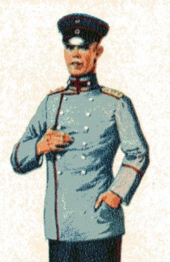 Hauptmann des Pionierbataillons Nr. 10 Minden/Westfalen in Litewka um 1910